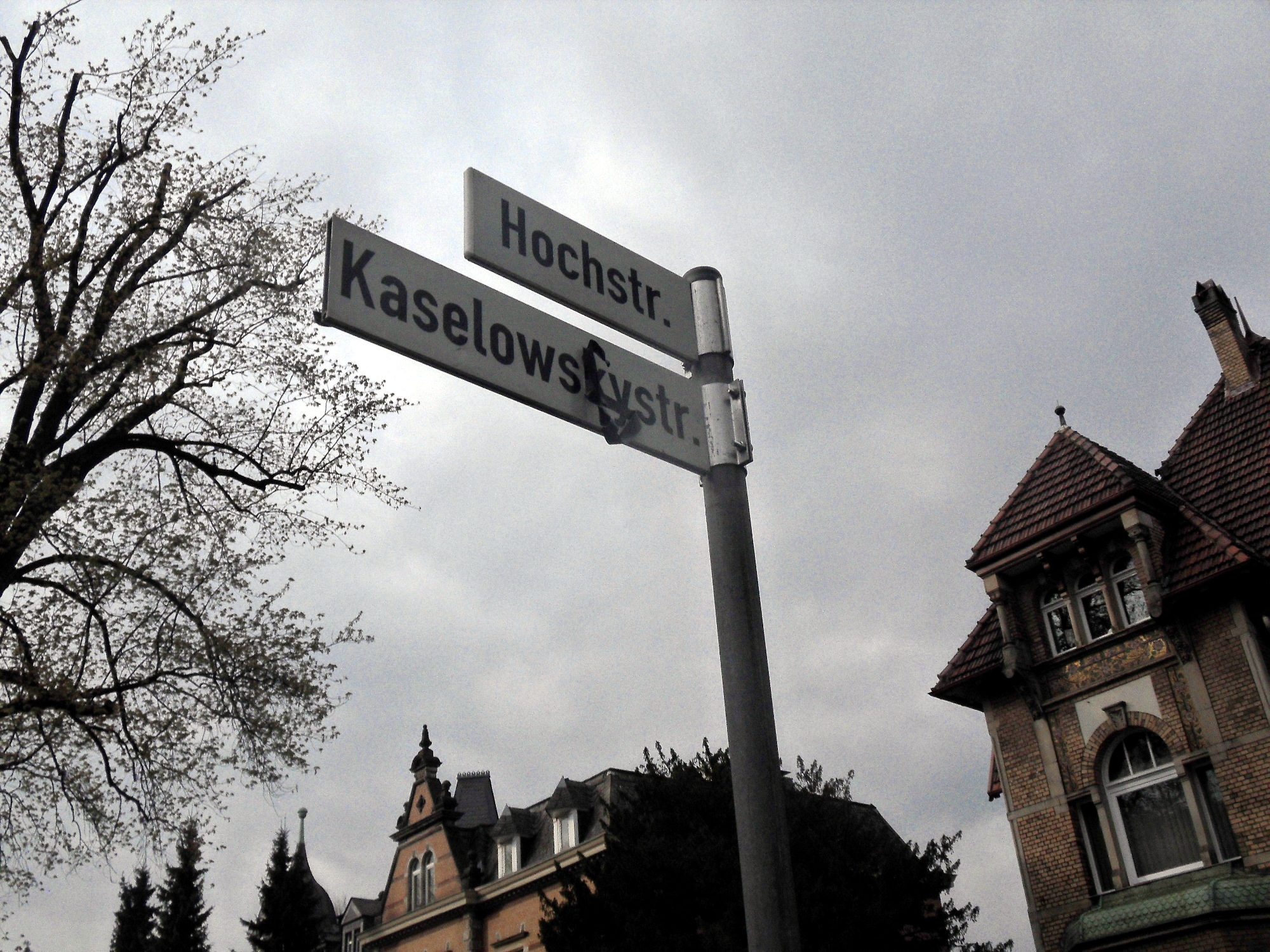 Das durchgestrichene Kaselowskystraßenschild zusammen mit dem neu angebrachten Hochstraßenschild